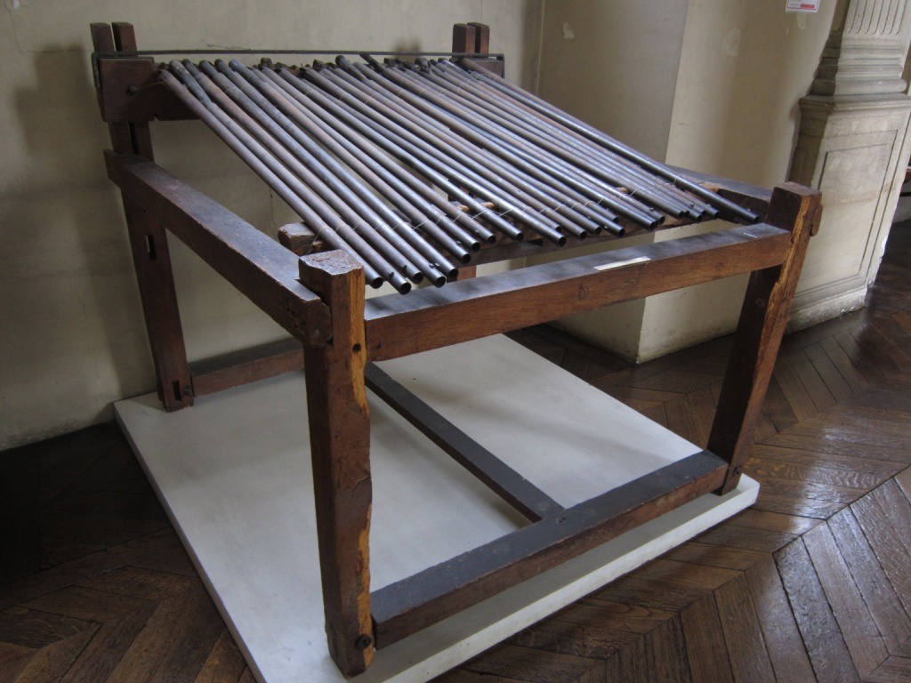 Machine infernale, attentat de Fieschi, Musée d'histoire de France, Archives nationales, Paris